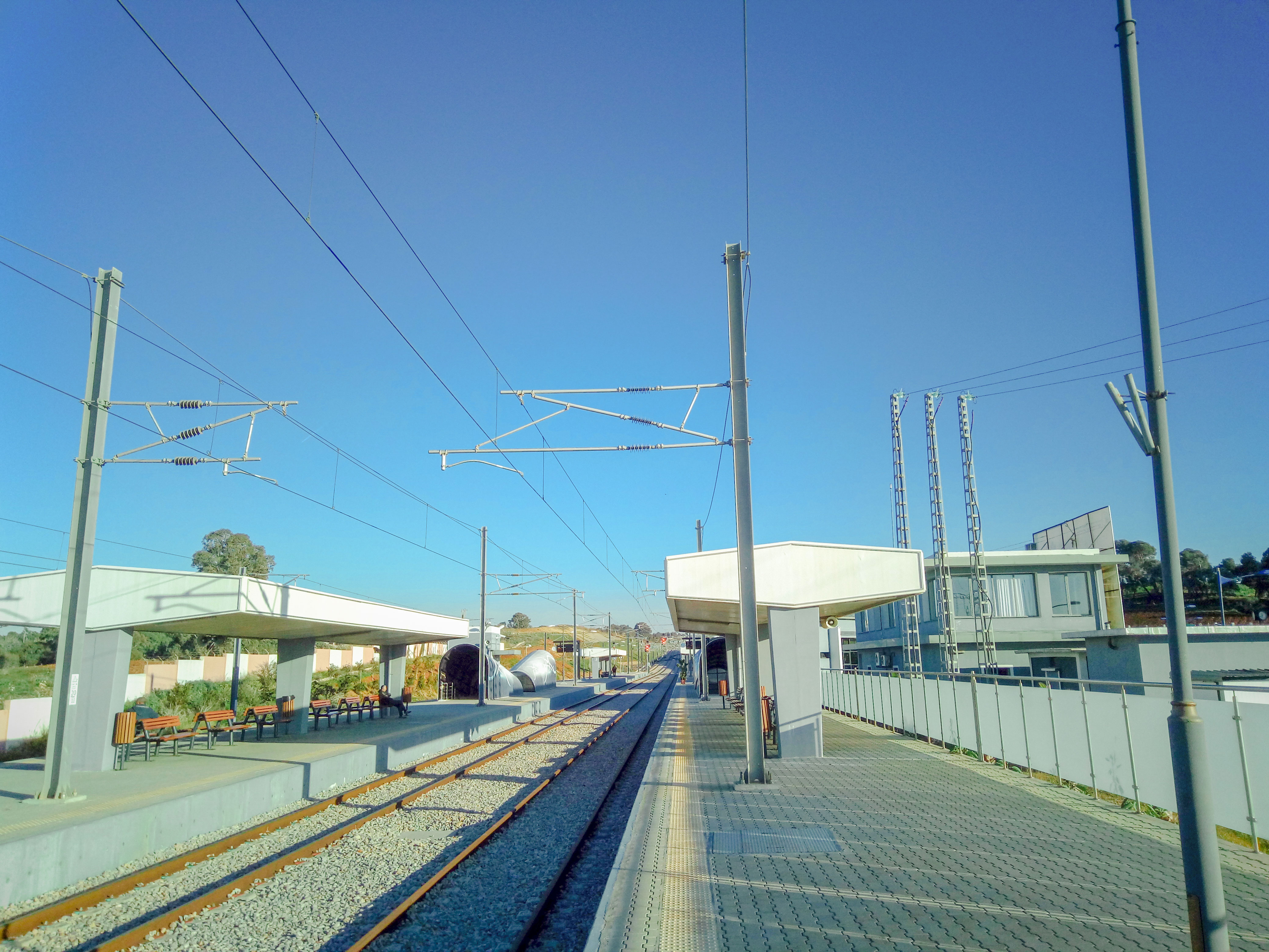 Gare ferroviaire de Zéralda.